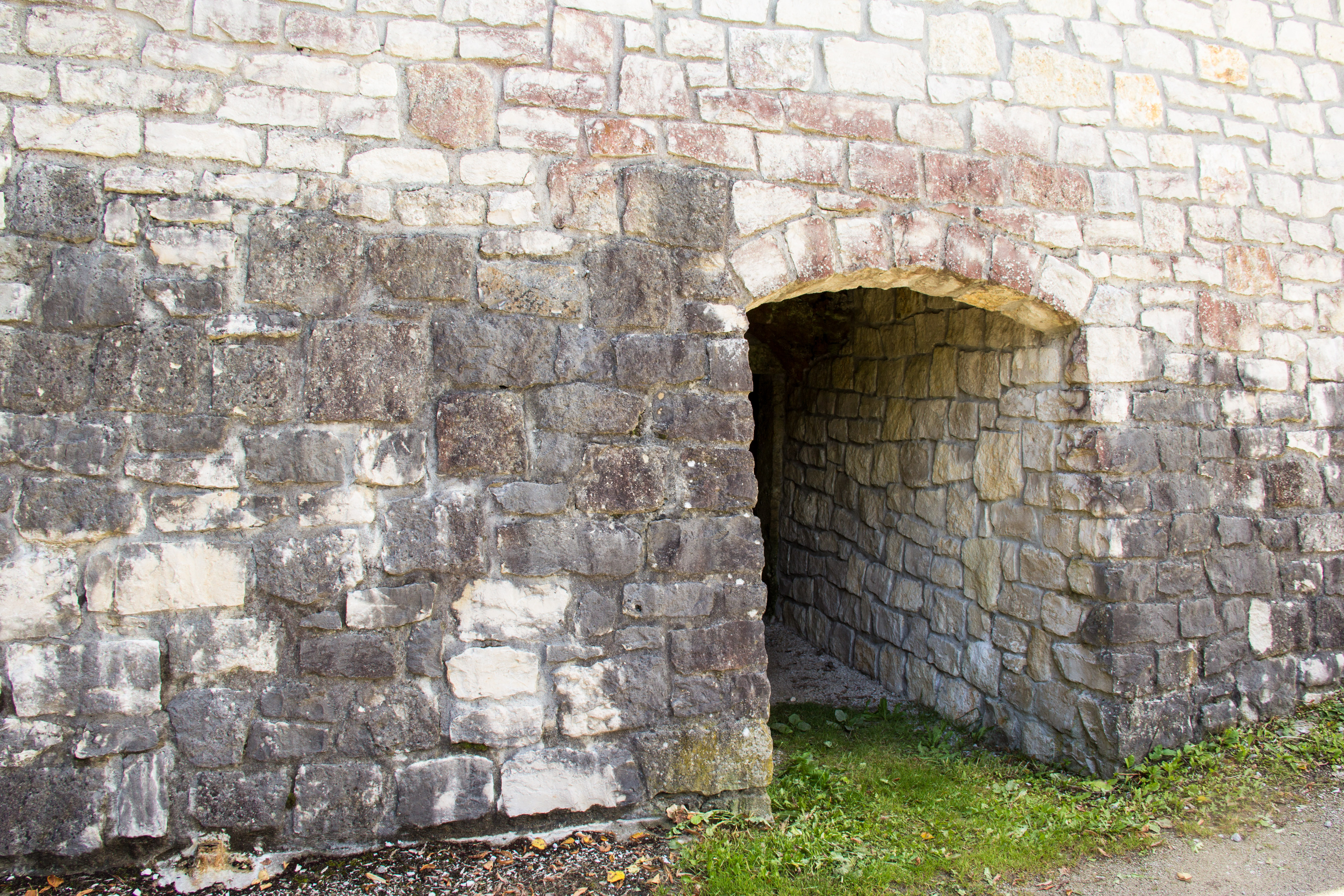 Felsenkeller unter dem Burgberg, EgloffsteinThis is a photograph of an architectural monument.